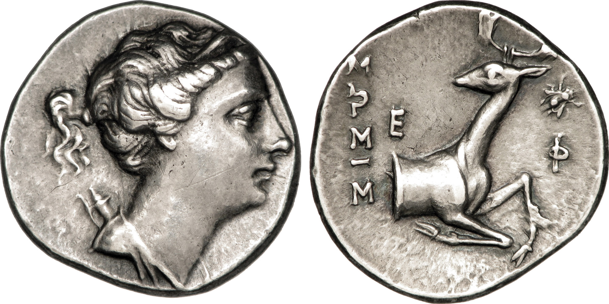 Nom de l'atelier : Ionie, Éphèse Métal : argent Diamètre : 20,5mm Axe des coins : 12h. Poids : 6,57g. Titulature avers : Anépigraphe. Description avers : Buste diadémé et drapé d’Artémis à droite, l’arc et le carquois sur l’épaule. Description revers : Protomé de cerf à droite, agenouillé, tournant la tête à gauche ; dans le champ à droite, une petite abeille. Légende revers : E-F/ SWSIS Traduction revers : (d’Éphèse/ Sosis).